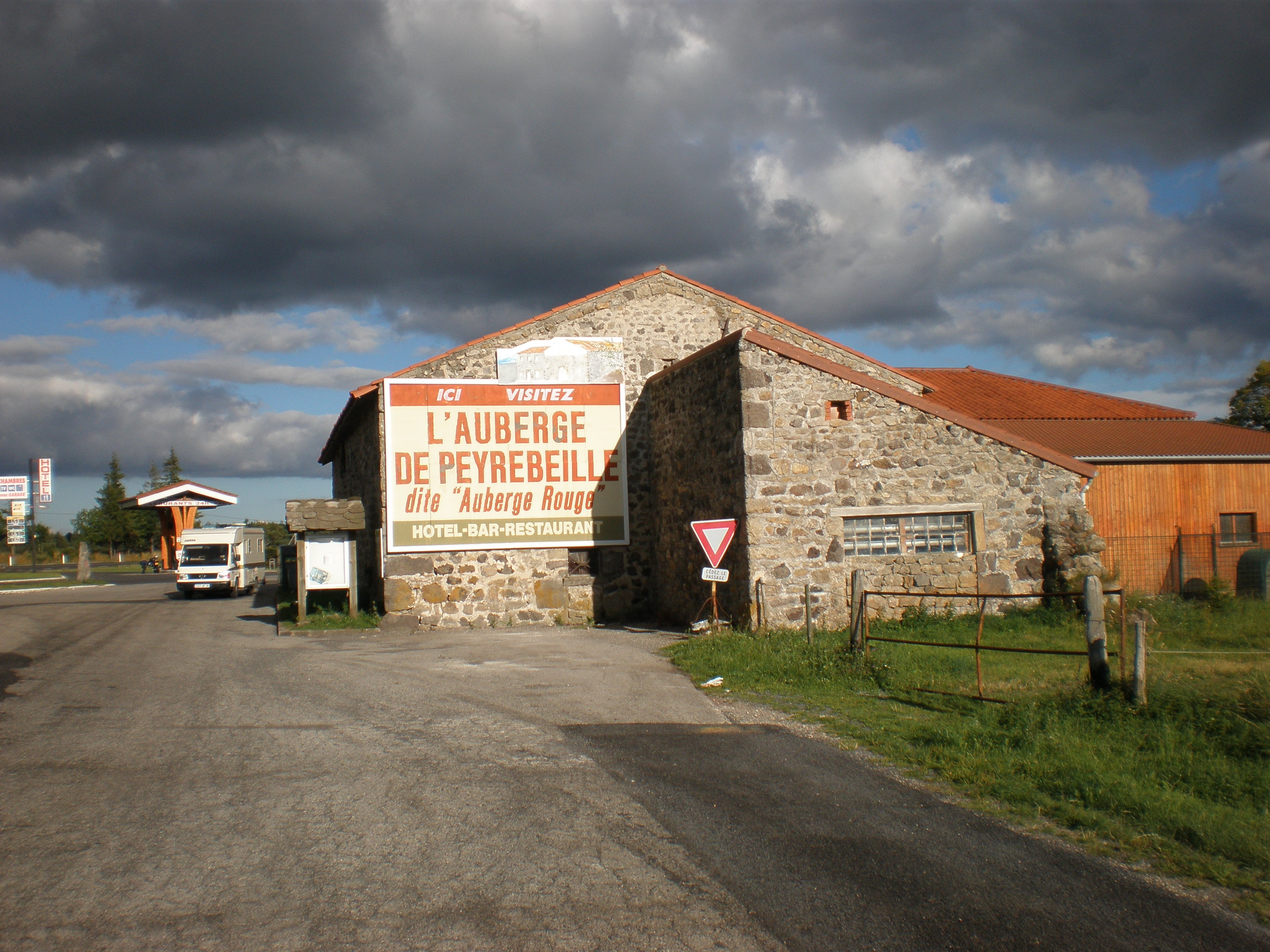 L'auberge de Peyrebeille en Ardèche